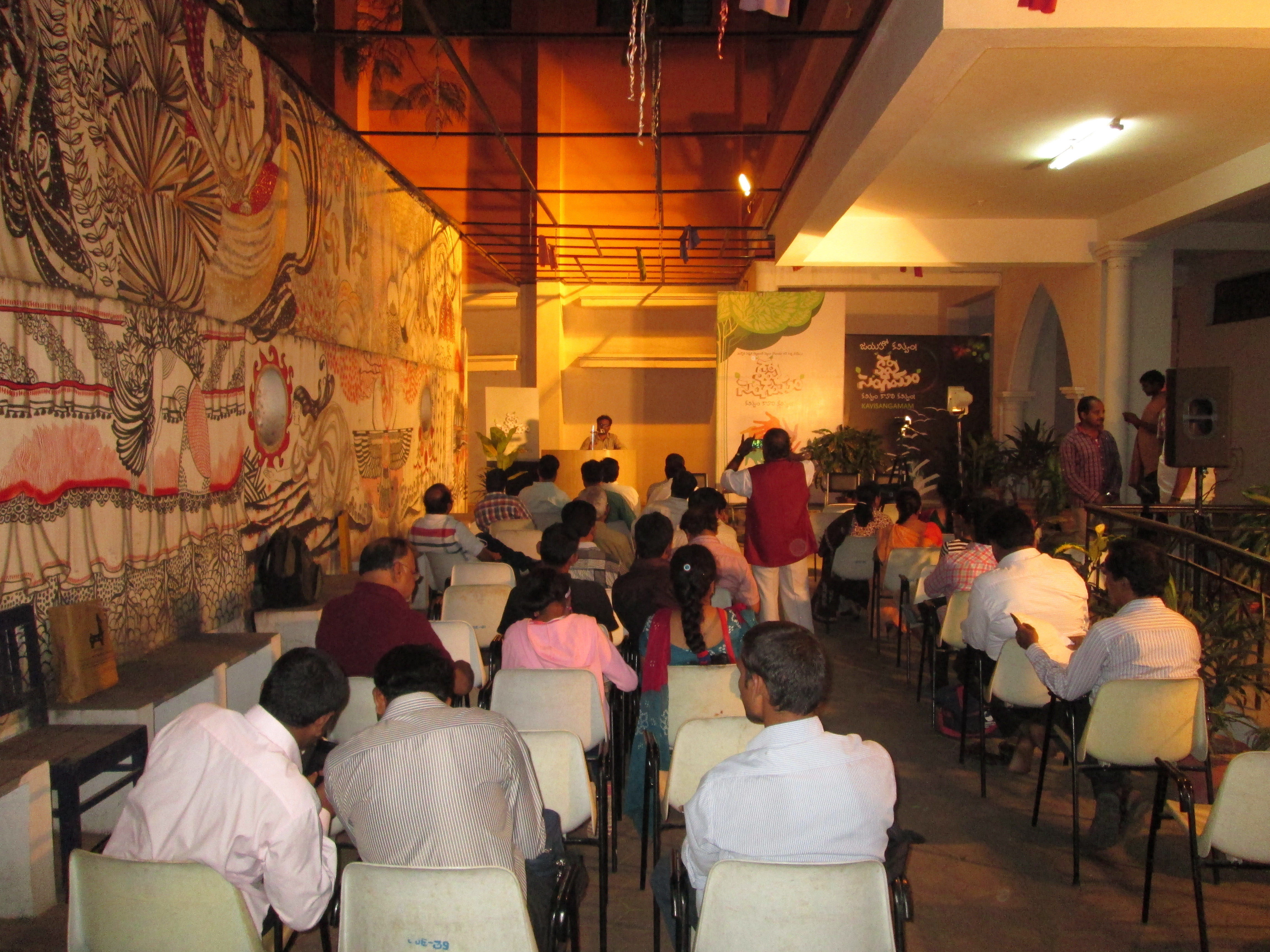 కవిసంగమం సిరీస్ - 22